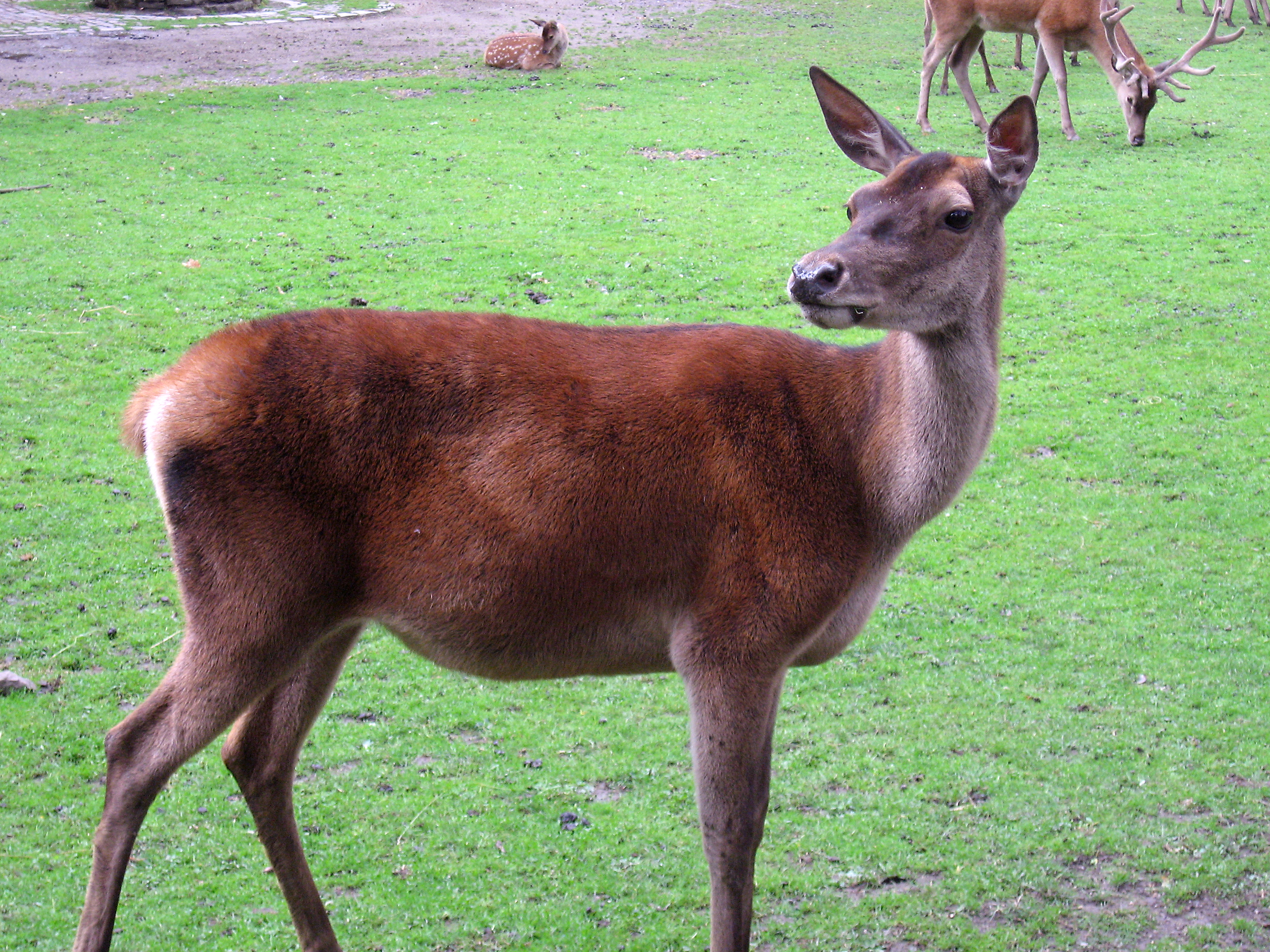 Dortmund, Tierpark, Hirschkuh (Cervus elaphus)